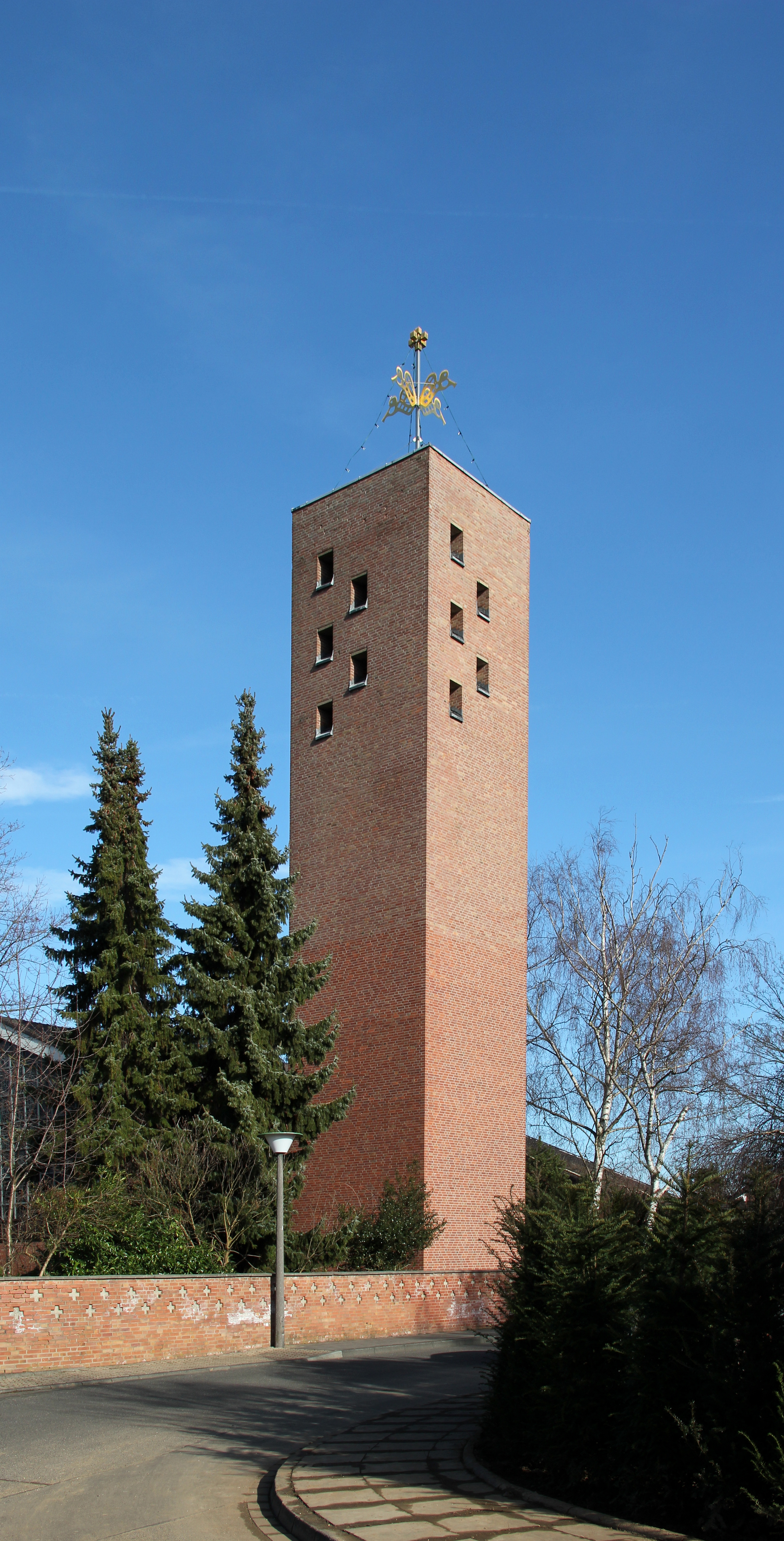 Sankt Michael, Erftstadt Blessem